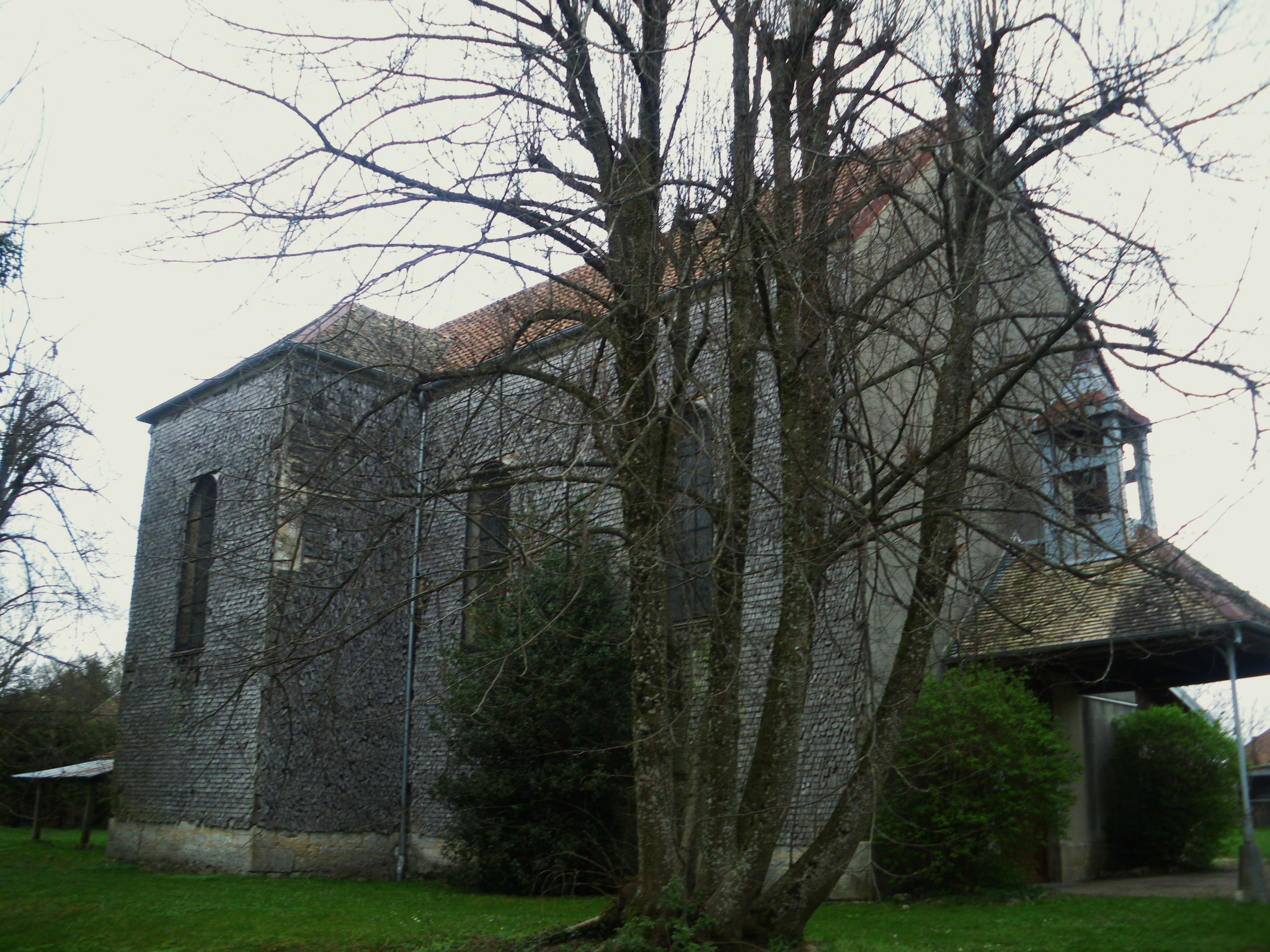 Bonnevaux le Prieuré ( Doubs )Eglise